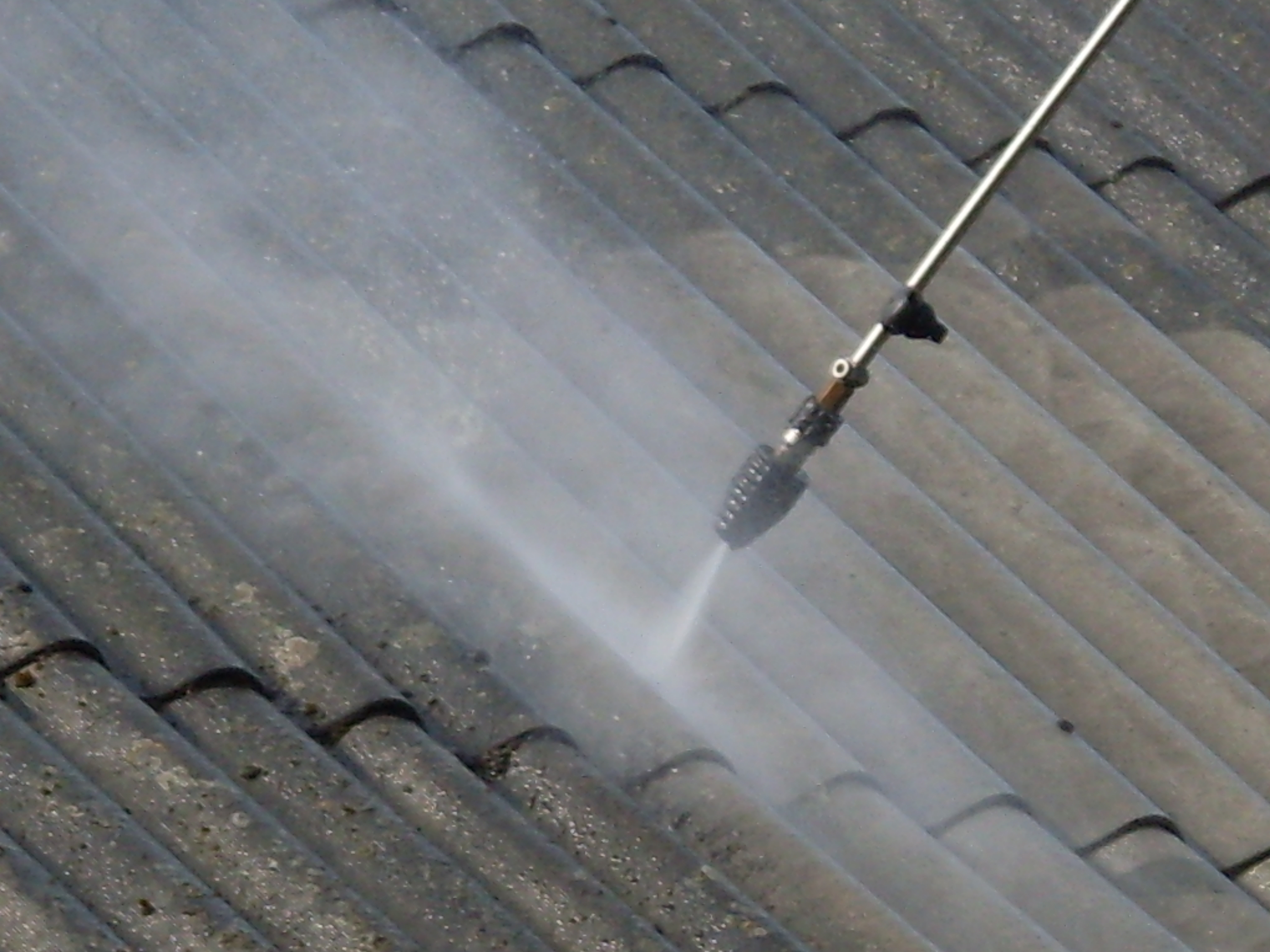 Чистка шифера водой